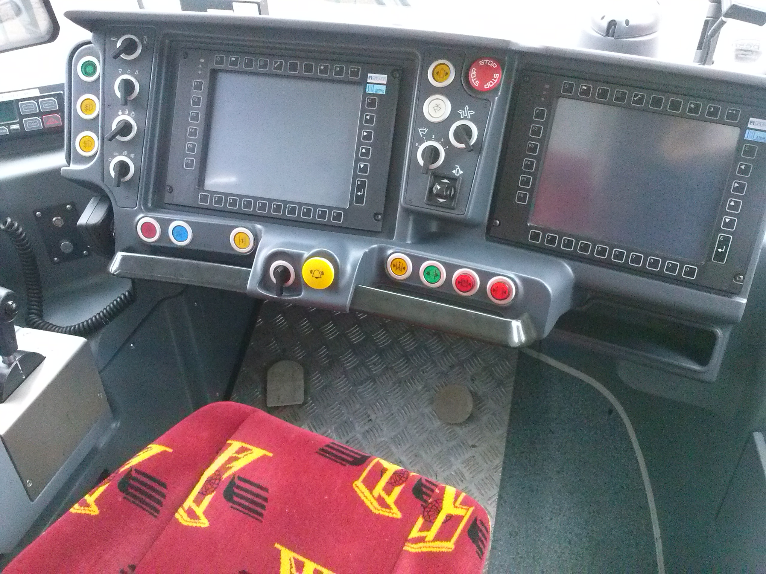 Kabina motorniczego w tramwaju Pesa Twist 2012N